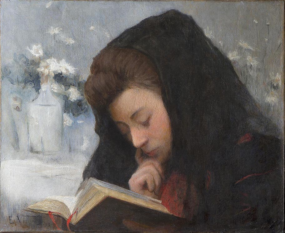 Obra do Projeto Eliseu Visconti